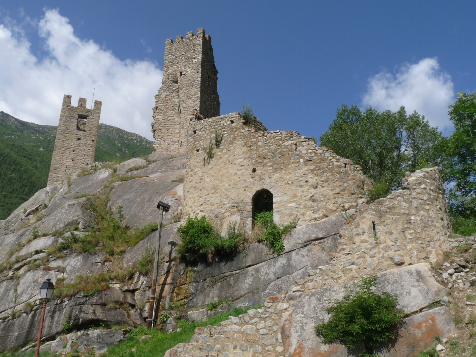 Tours de Carol, Porta, Pyrénées-Orientales, France